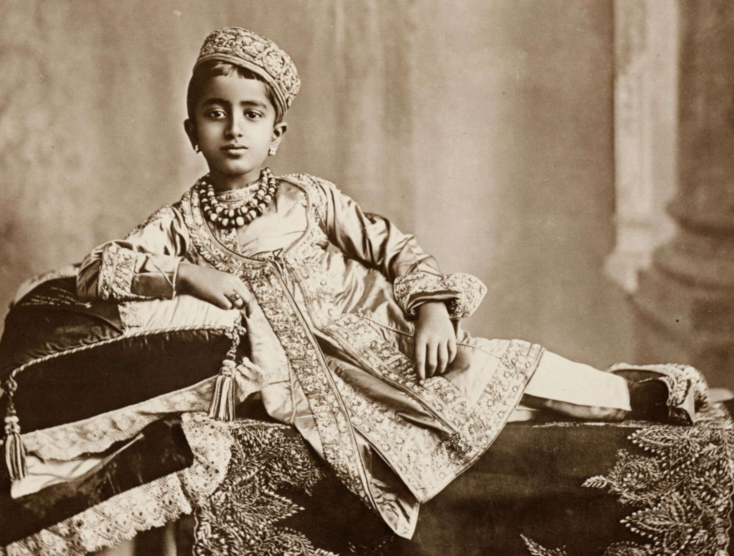 Dayal, Raja Lala Deen: Fateh Singh Rao, der älteste Sohn des Gaekwar von Baroda